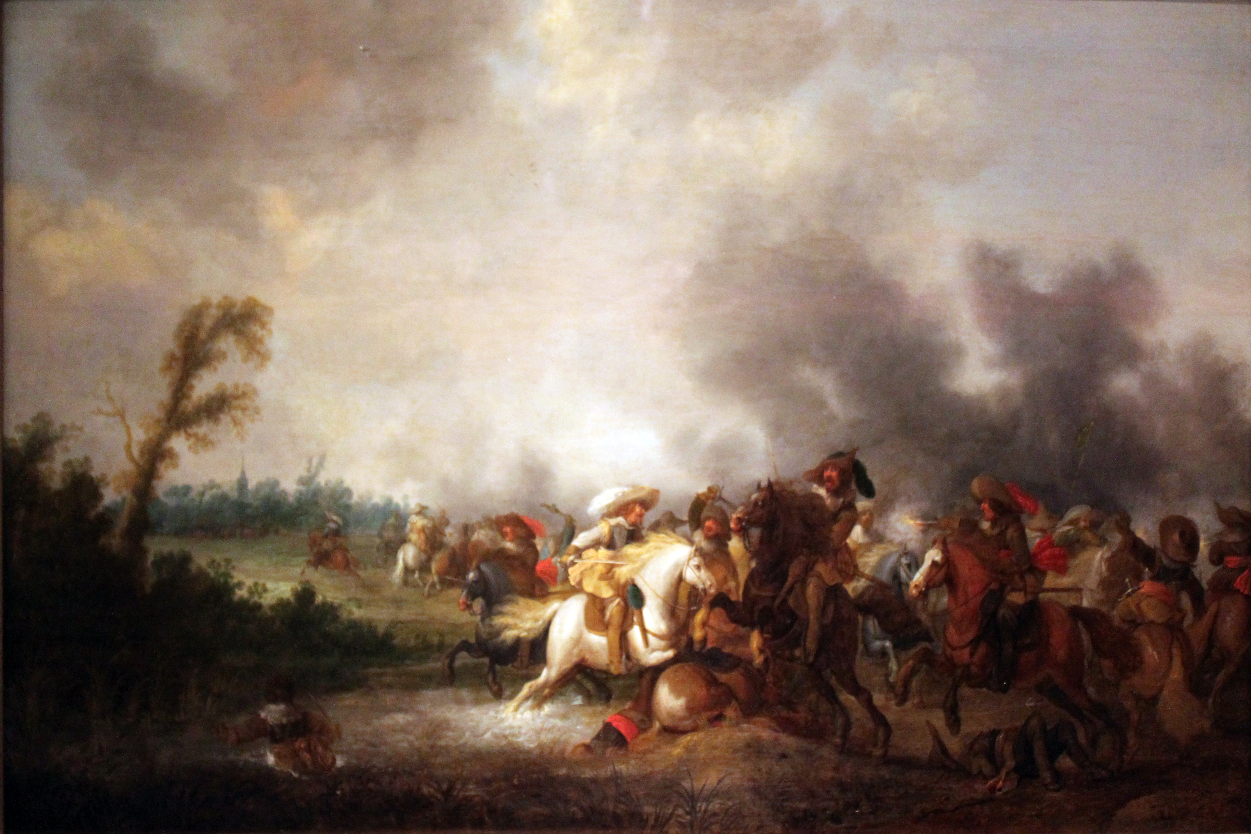 Cavalry Engagement